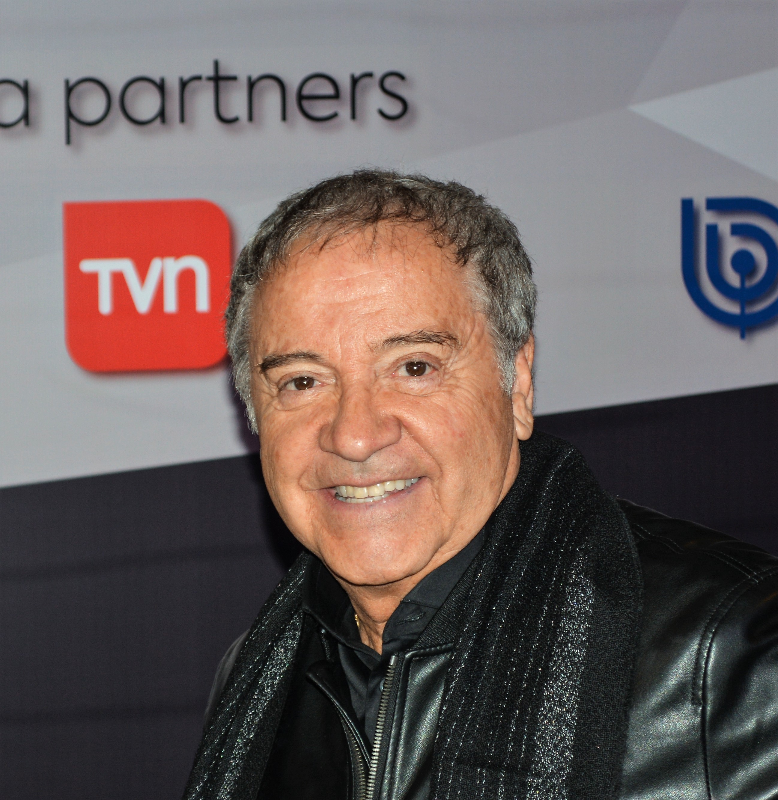 Premios Pulsar 2017